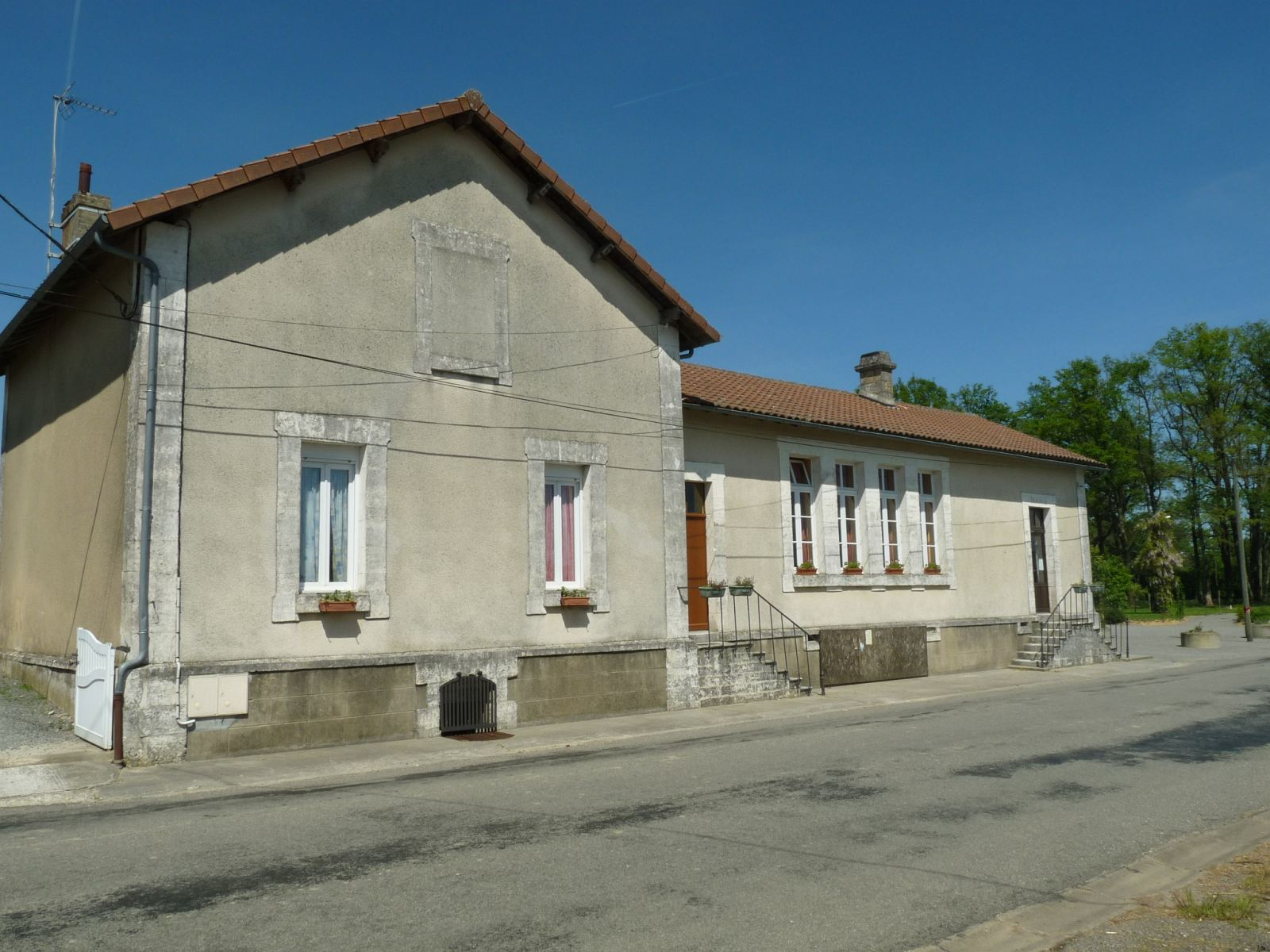 mairie de Sauvagnac, Charente, France